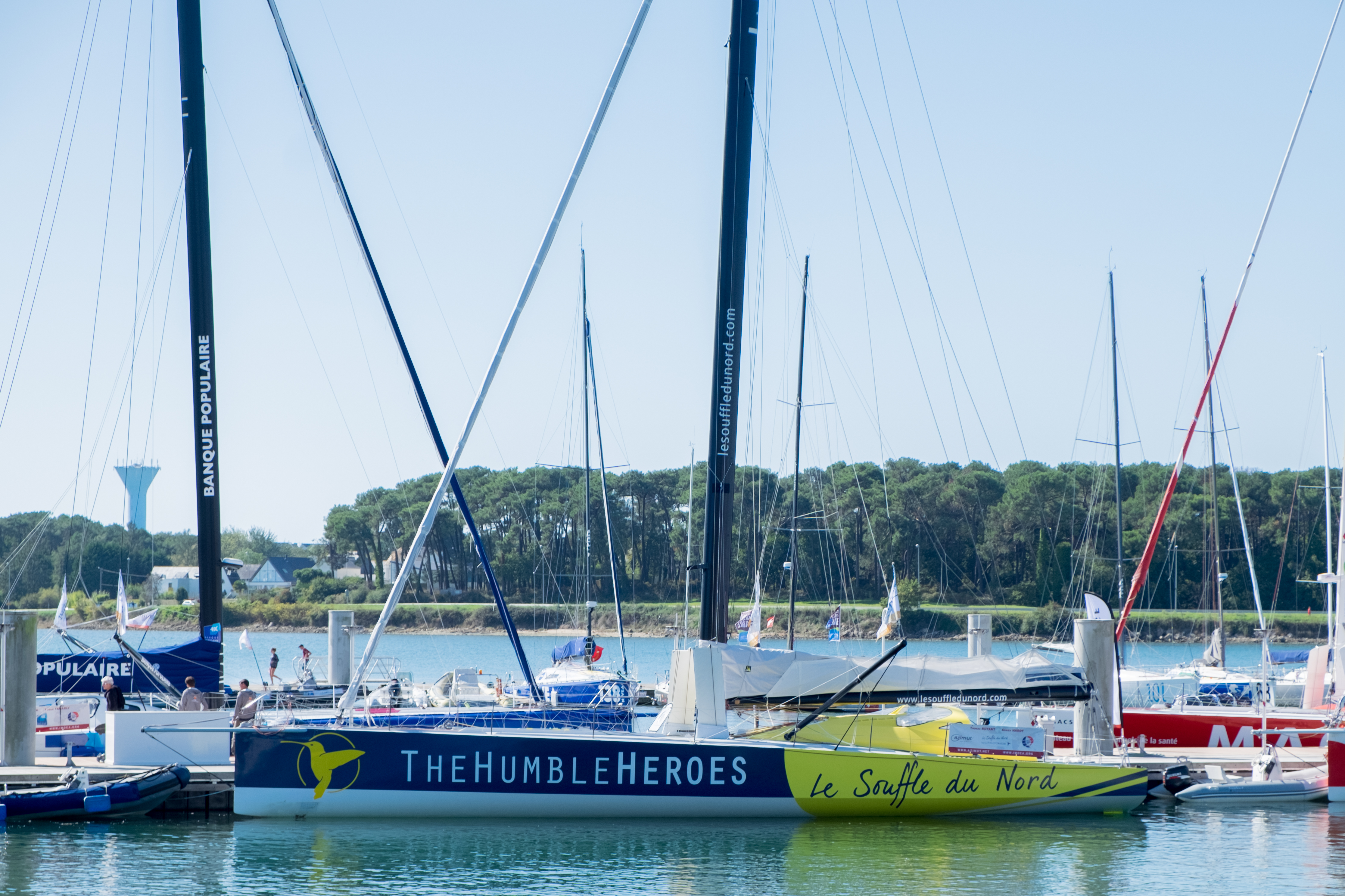 Le 60 pieds IMOCA Le Souffle du Nord, skippé par Thomas Ruyant.